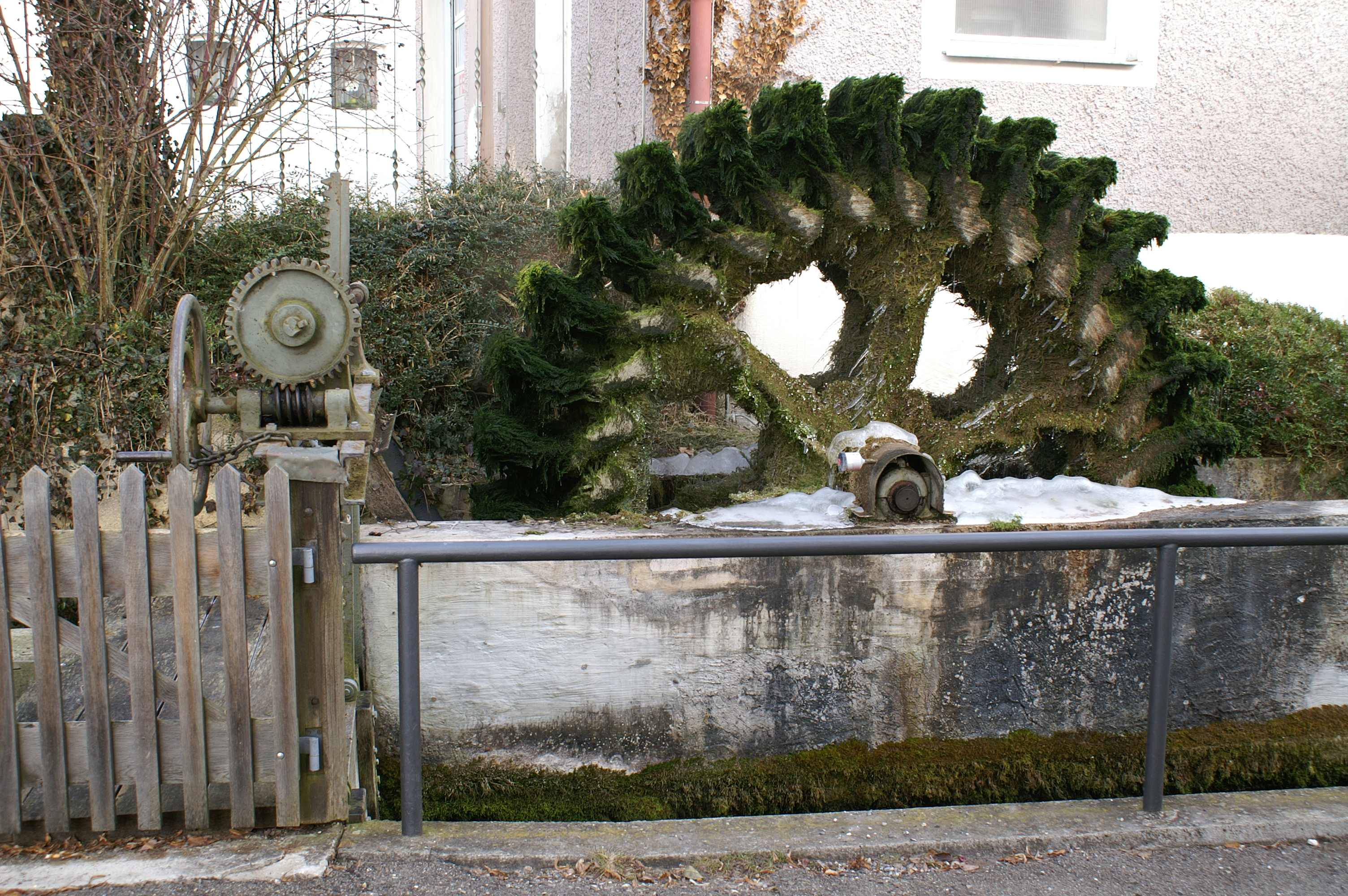 An der Ach in Weiler bei Blaubeuren dreht sich ein historisches Wasserrad